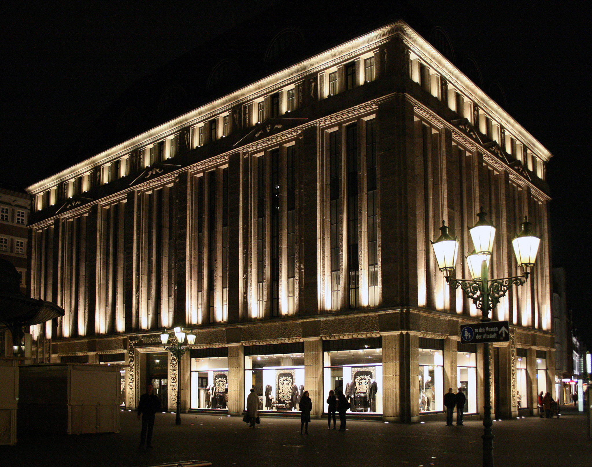 Das Carsch-Haus in der Düsseldorfer Altstadt